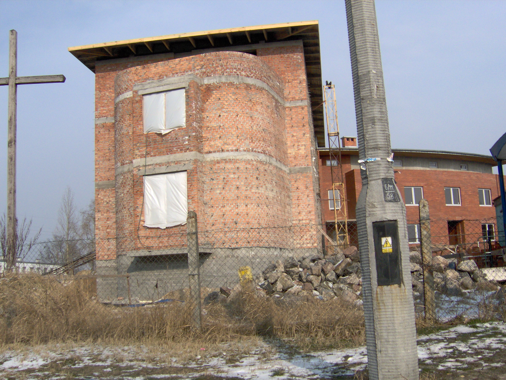 Budowa kościoła przy ul. Płockiej 167A (2007 r.)